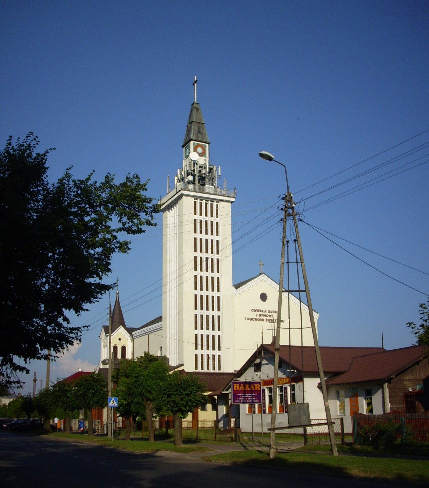 Kościół pw. Świętej Trójcy w Terespolu.